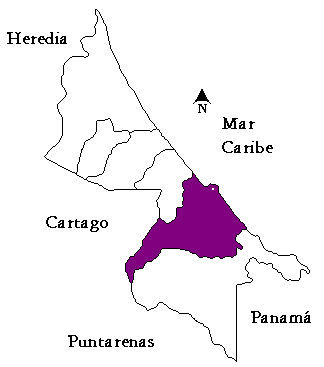 Mapa del cantón de Limón, provincia de Limón, Costa Rica